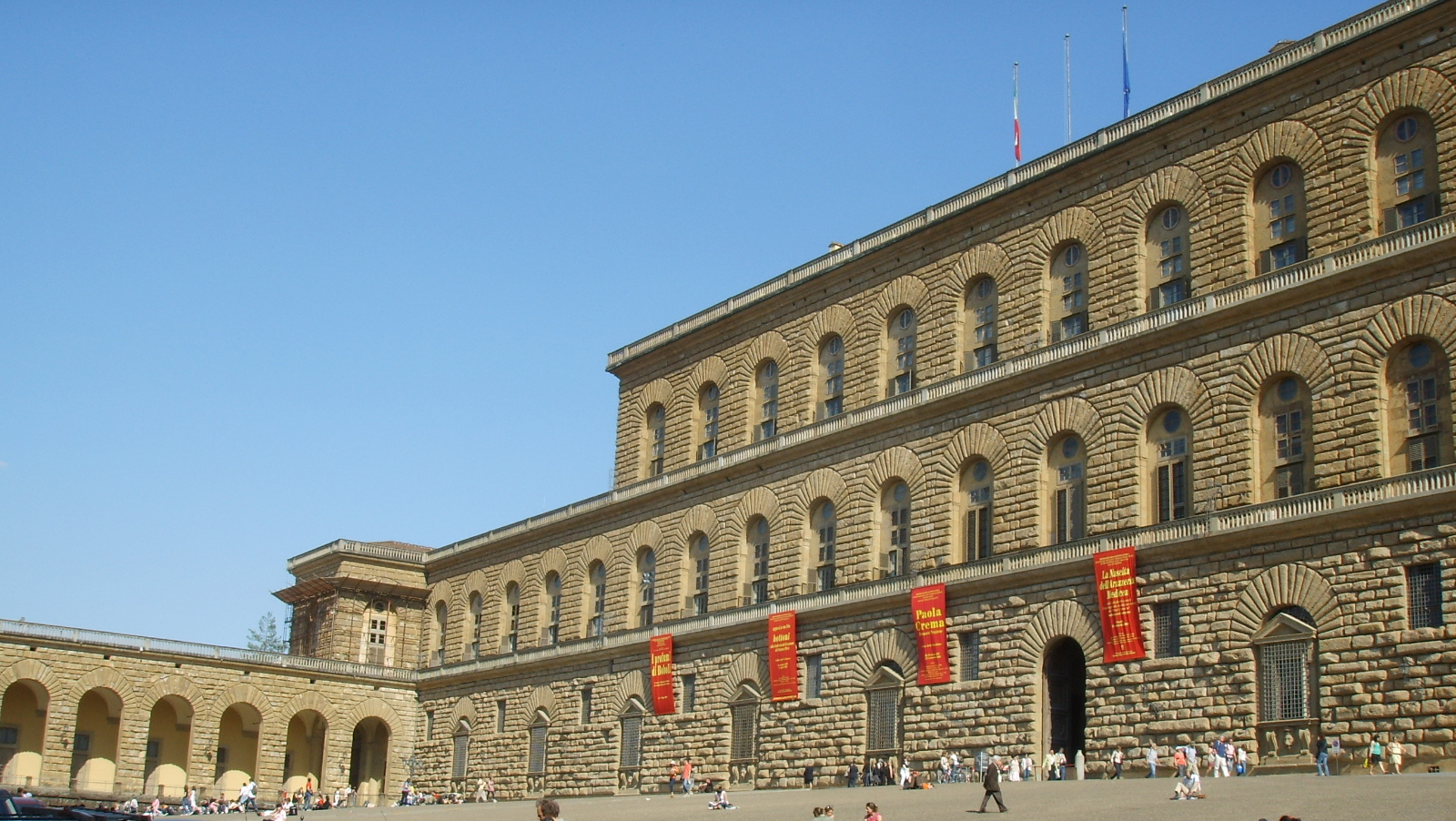 Facciata di Palazzo Pitti a Firenze.